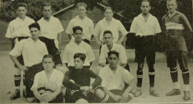 Julio Bustamante, Bermúdez, Pepe Henríquez, Carlos “catire” Maal y Franco “Indio” Russo (Centro Atlético); Leopoldo Márquez, Roberto Pérez y Santiago Pérez (Loyola); Ernesto de Aramburu, Víctor Brito y Víctor Lara (Venzóleo).